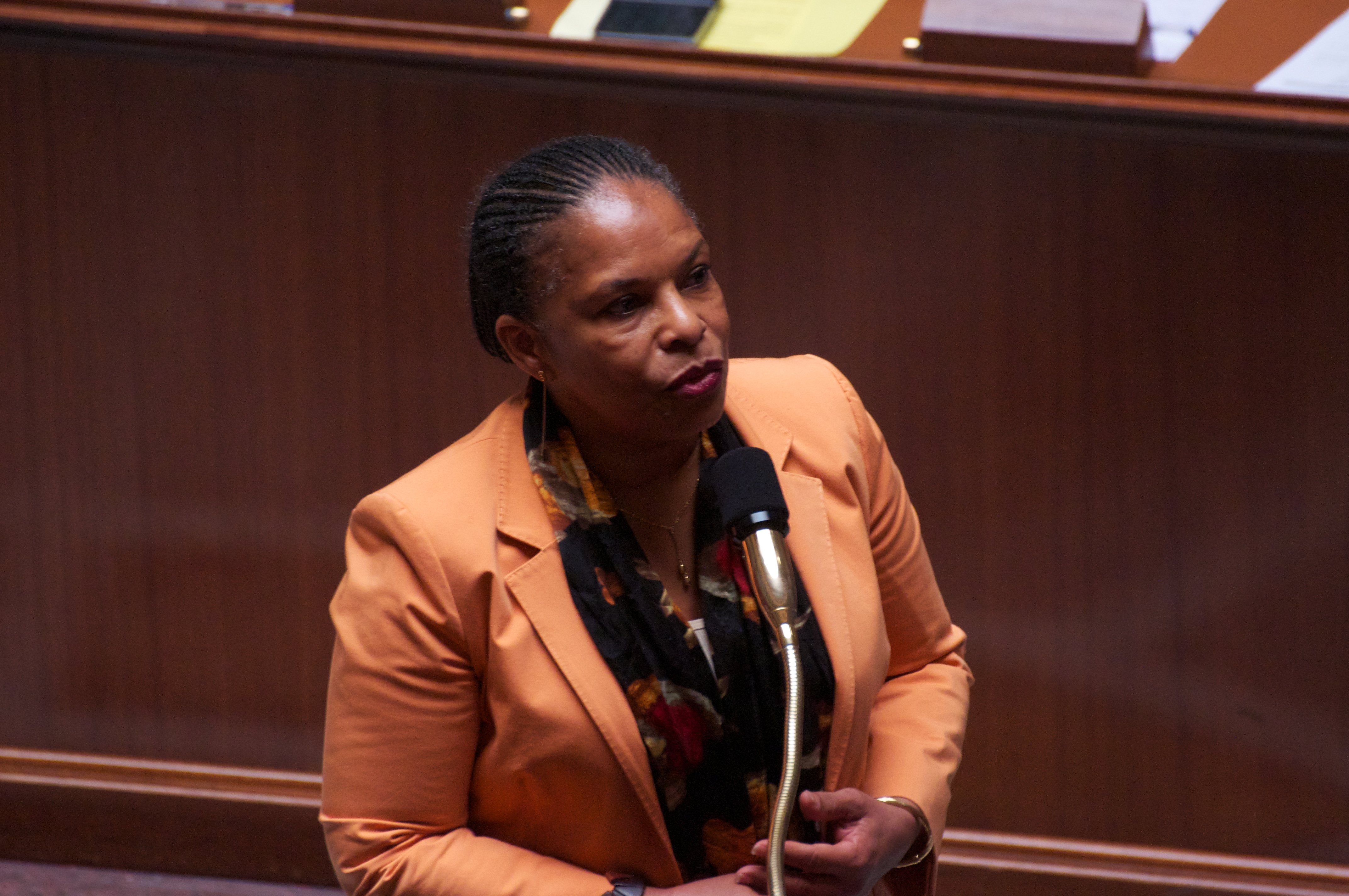 Discours de Christiane Taubira après le vote solennel de la loi ouvrant le mariage aux couples de personnes de même sexe - Assemblée nationale